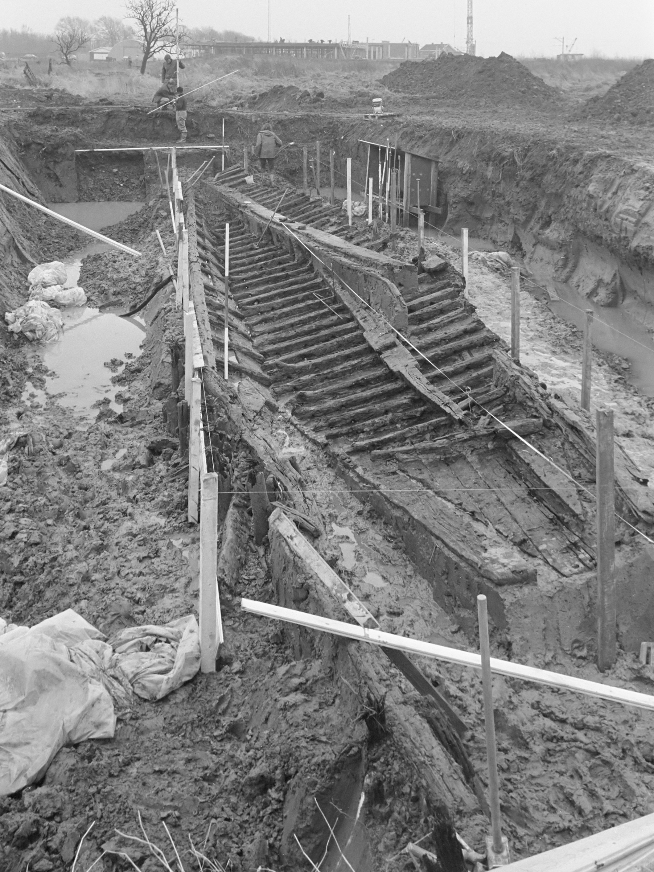 Romeins schip Zwammerdam 2 opgegraven bij Zwammerdam 28 november 1972